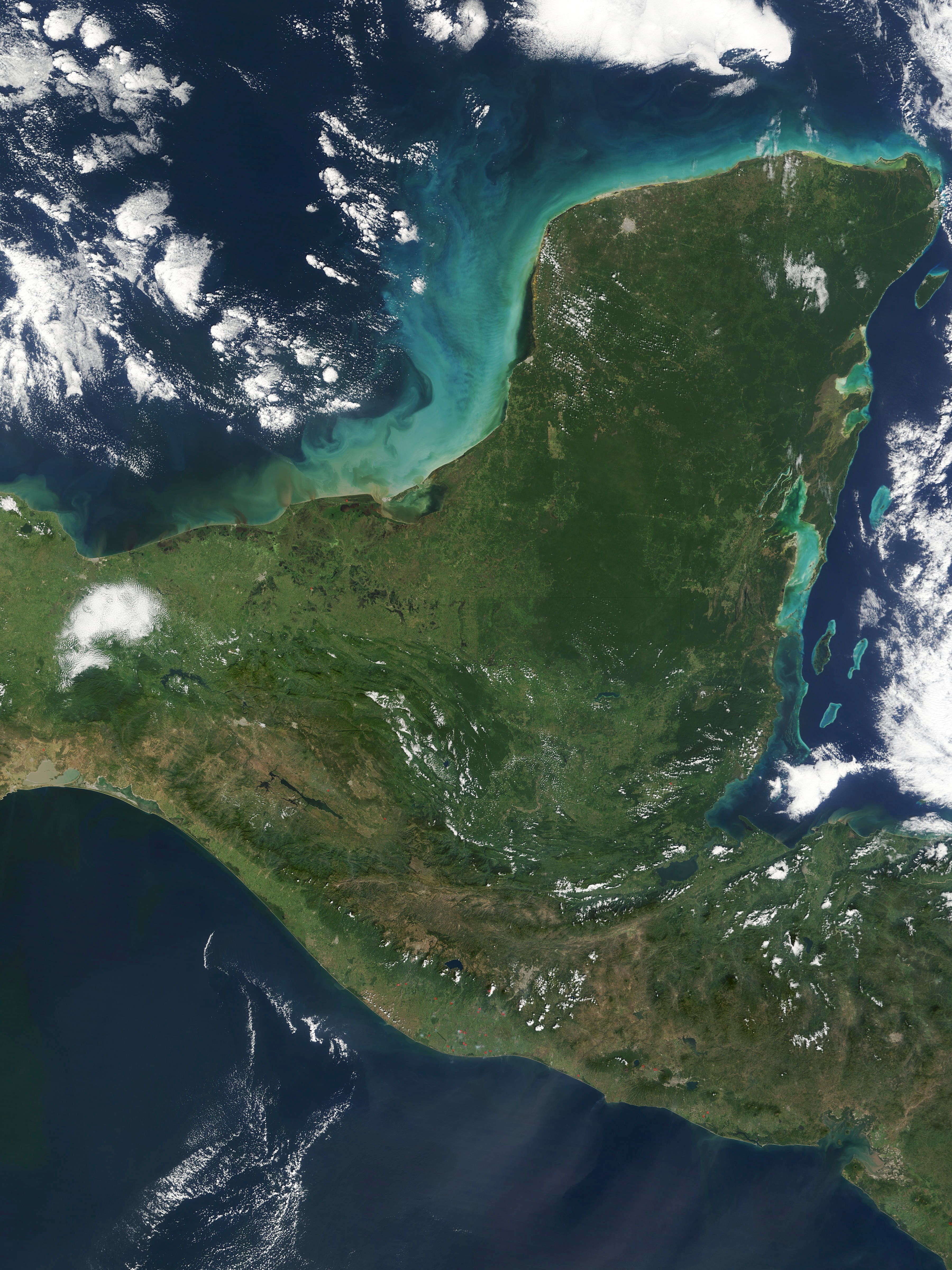 imagen satelital de la Península de YucatánMéxico